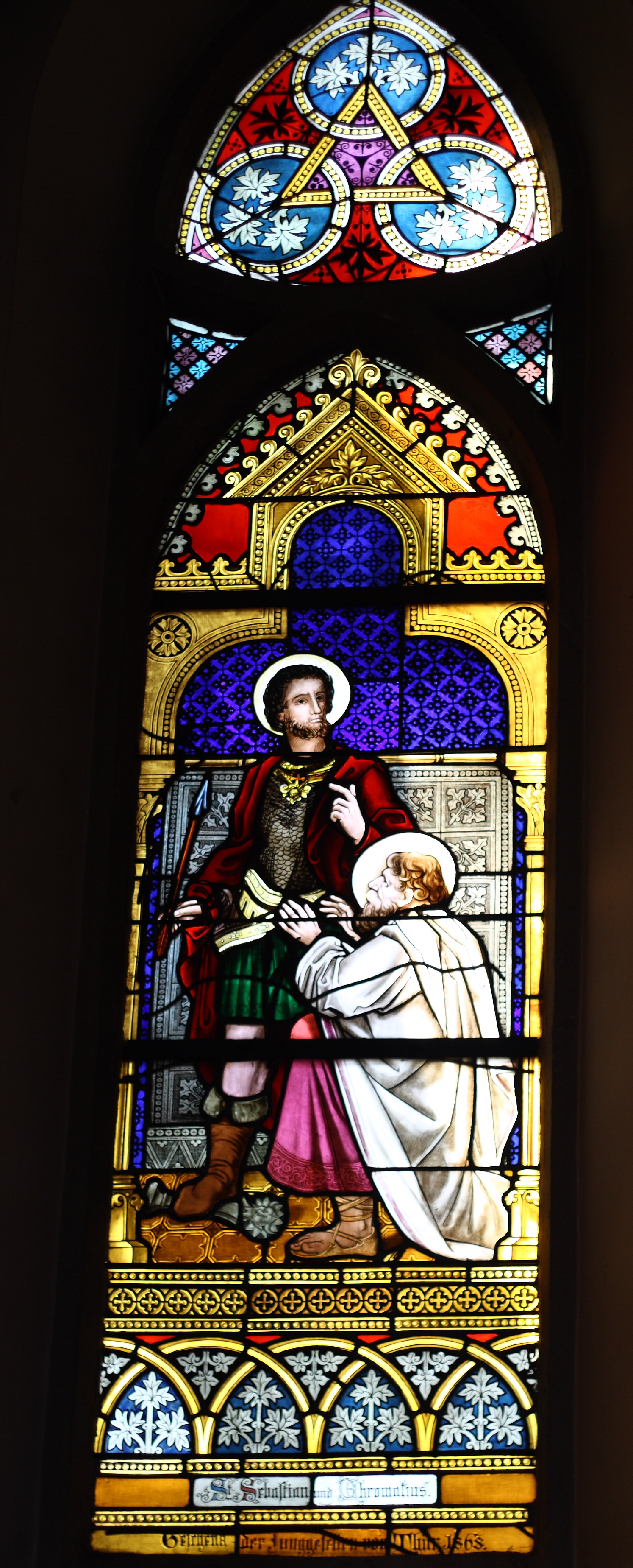 Bleiglasfenster in der katholischen Pfarrkirche St. Johannes in Thür, Darstellung: hl. Sebastianus und Chromatius